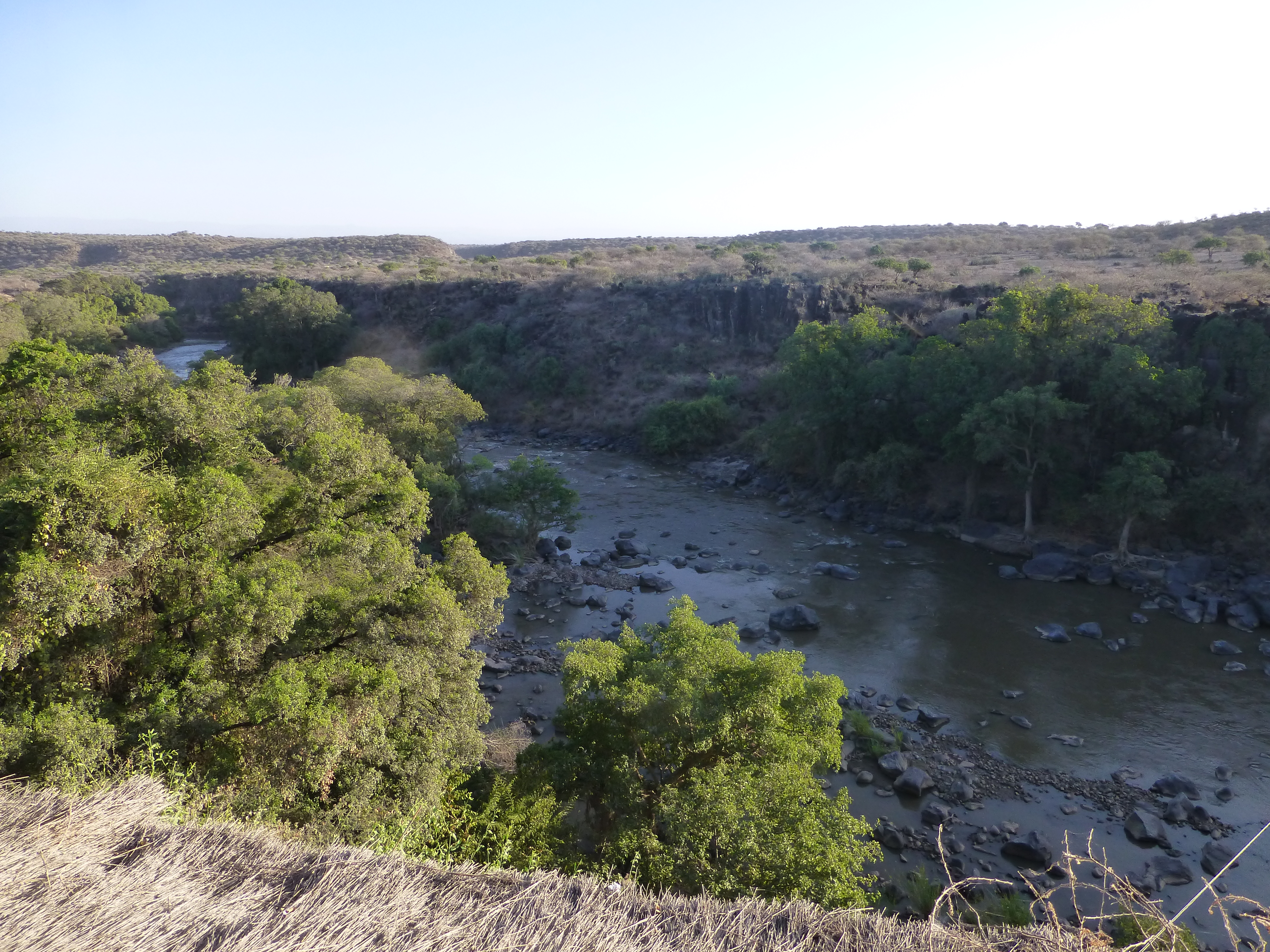 La rivière Awash au Parc national d'Awash (Ethiopie)